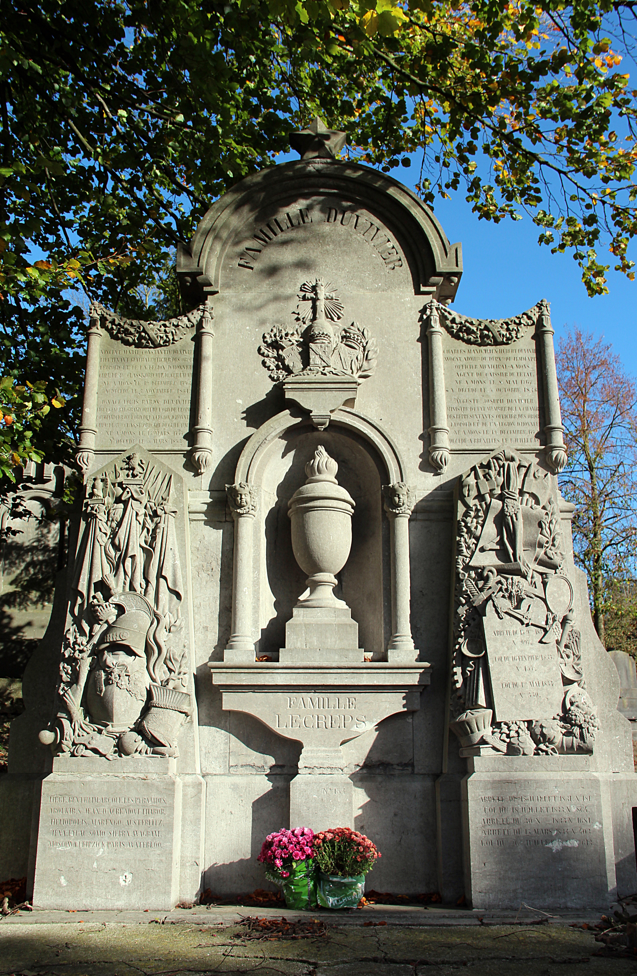 Mons (Hainaut) (Belgique), partie ancienn du cimetière communal; monument funéraire des familles Duvivier et Lecreps.